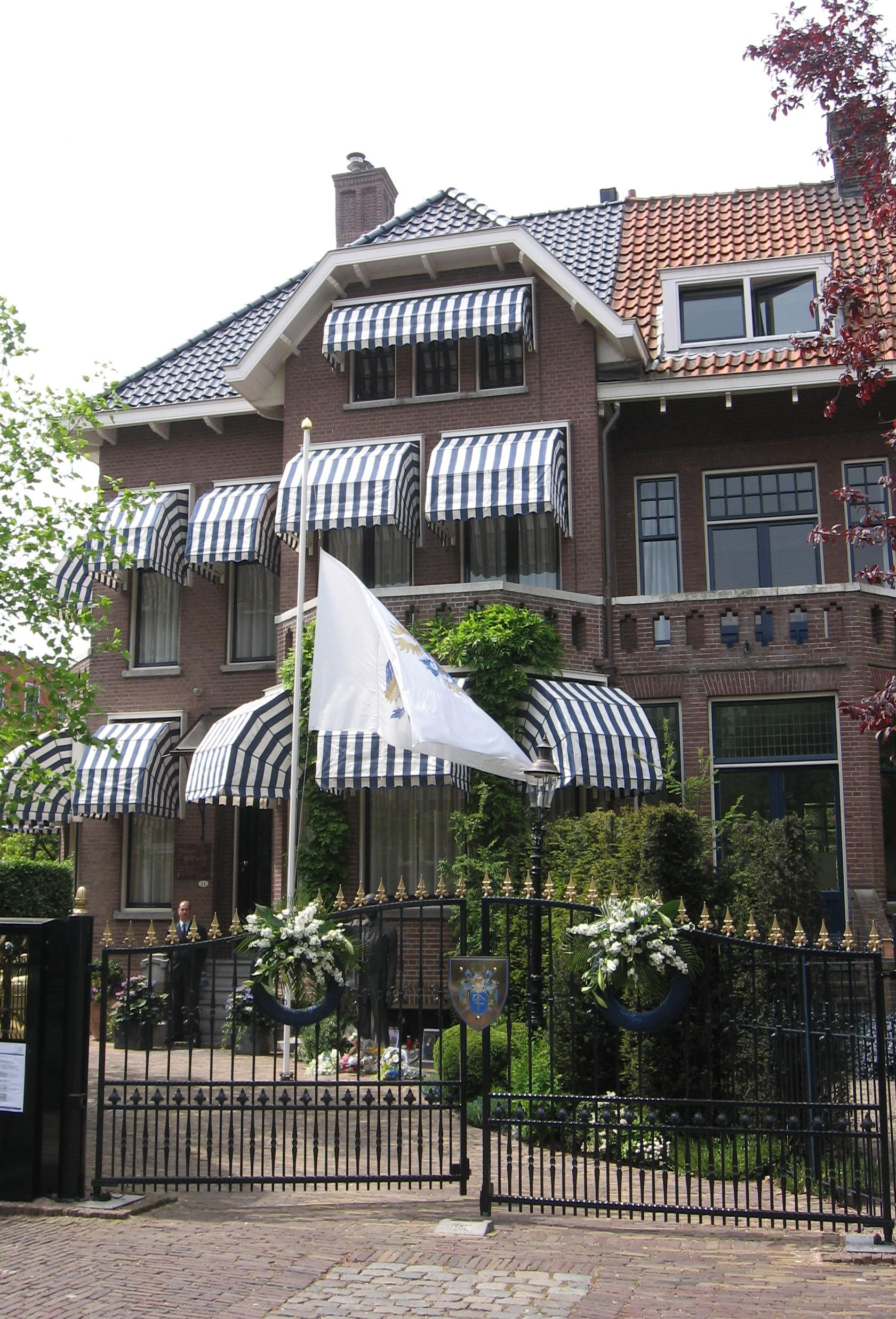 Huis Pim Fortuyn (periode 1998-2002), Palazzo di Pietro, 6 mei 2007